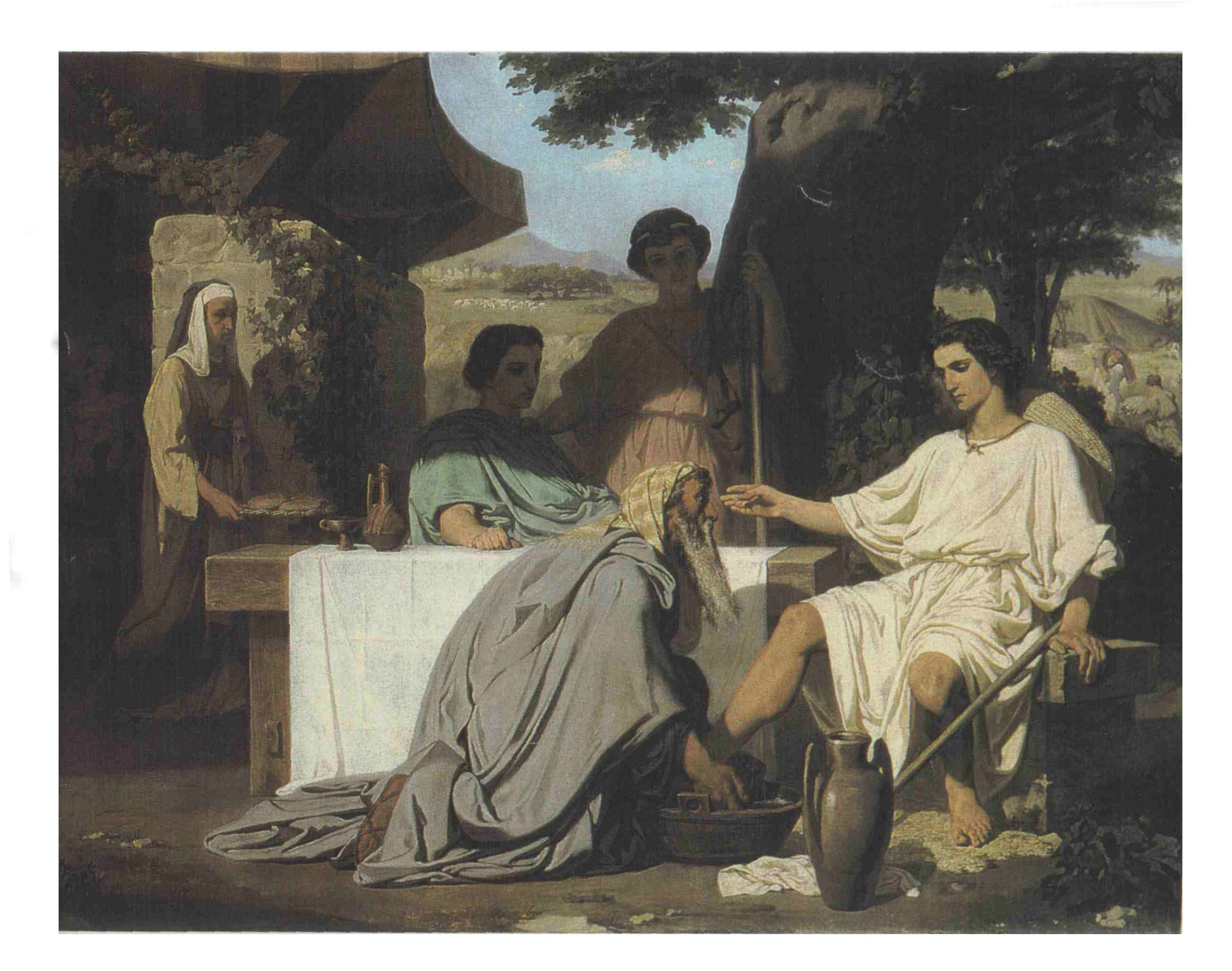 tableau par Félix-Henri Giacomotti : Abraham lavant les pieds aux anges